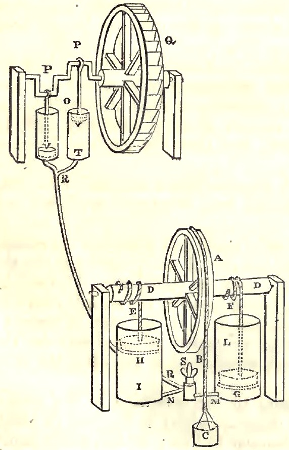 空気ポンプにより水車動力を遠隔地へ伝送するドニ・パパンの方法（改良版）